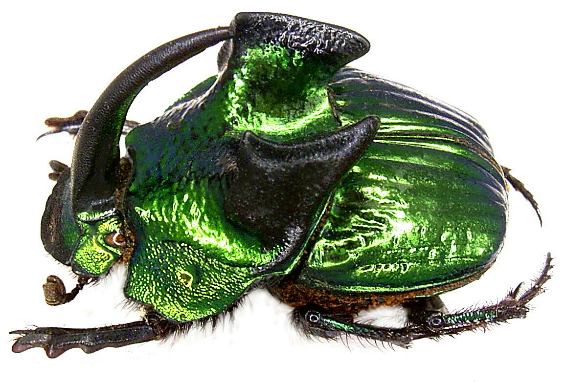 Familie: Scarabaeidae Grösse: 13-22 mm Verbreitung: Mexiko Fundort: Mexiko, Chiapas leg. N.Flauger; det. U.Schmidt Foto: U.Schmidt, 2006